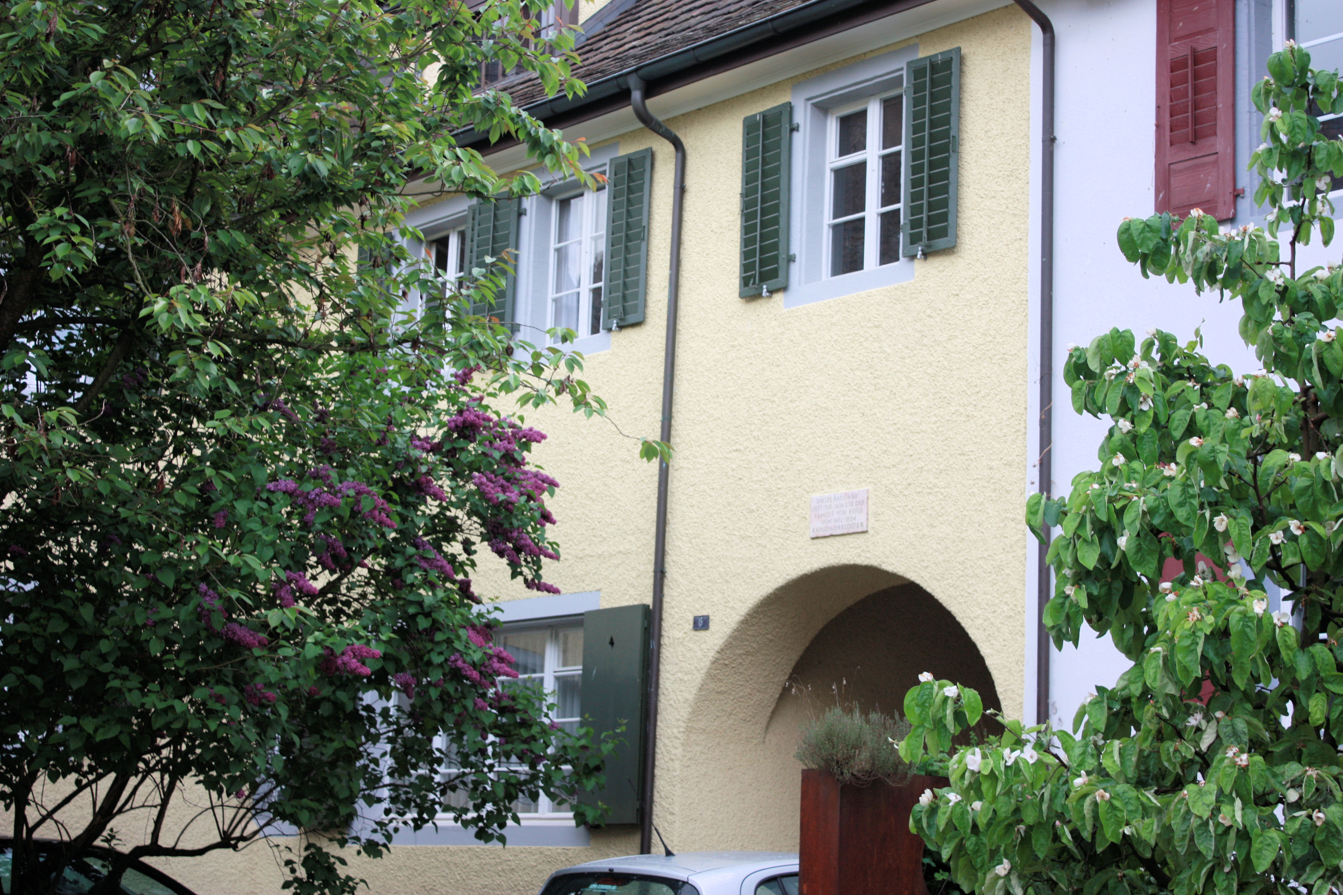 Umgebauter ehemaliger Osttrakt des Kapuzinerklosters Rheinfelden AG auf dem Standort des ehemaligen Hauses der Stifterfamilie von Eggs bis 1634. Torbogen zum Haus Wassergasse 6 mit der Tafel: "Dieses Haus war von 1567-1634 Sitz der Familie von Eggs von 1657 bis 1804 Kapuzinerkloster".